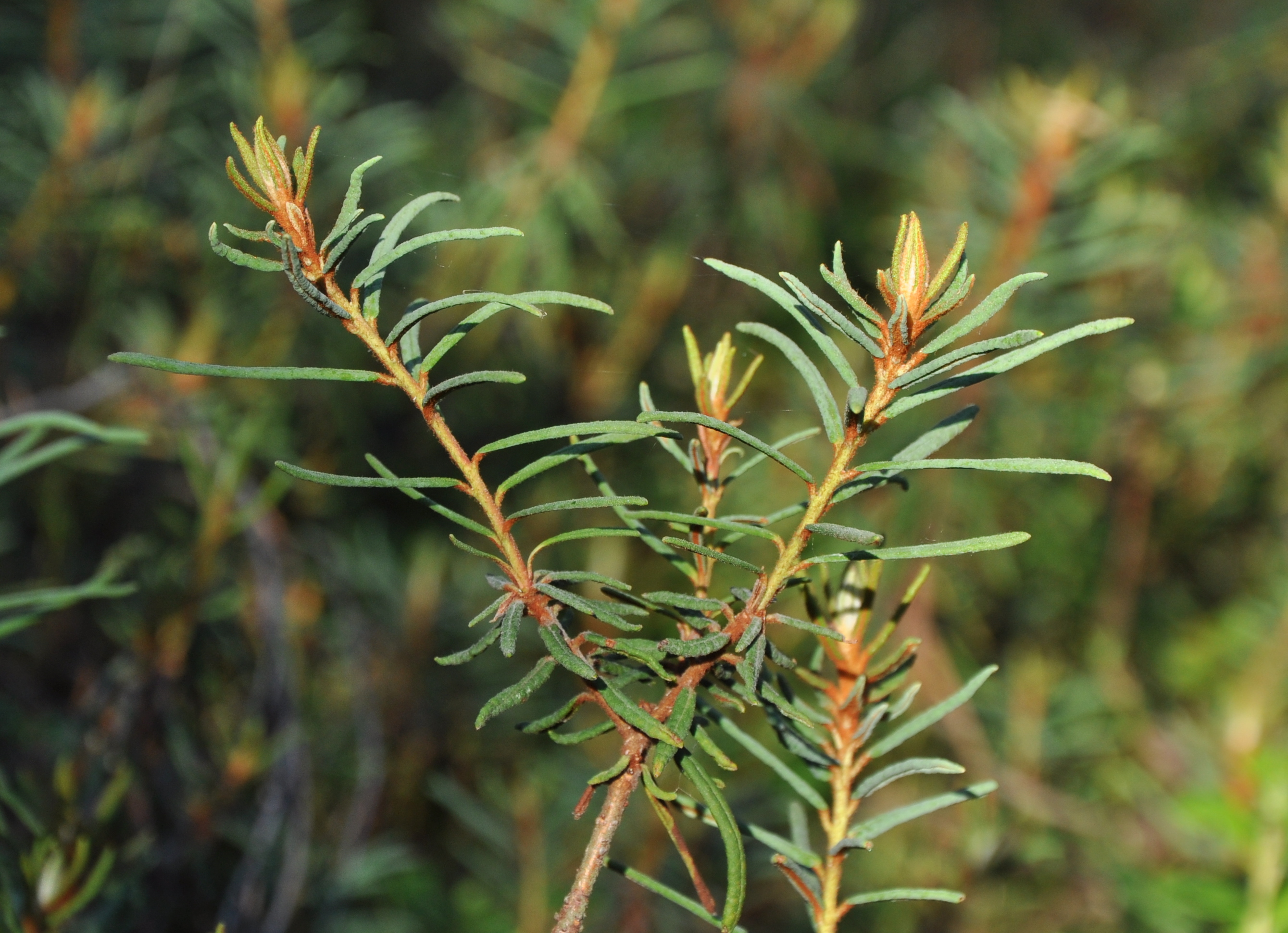 Bagno zwyczajne (Ledum palustre) w rezerwacie przyrody "Nadmorski bór bażynowy w Mrzeżynie"